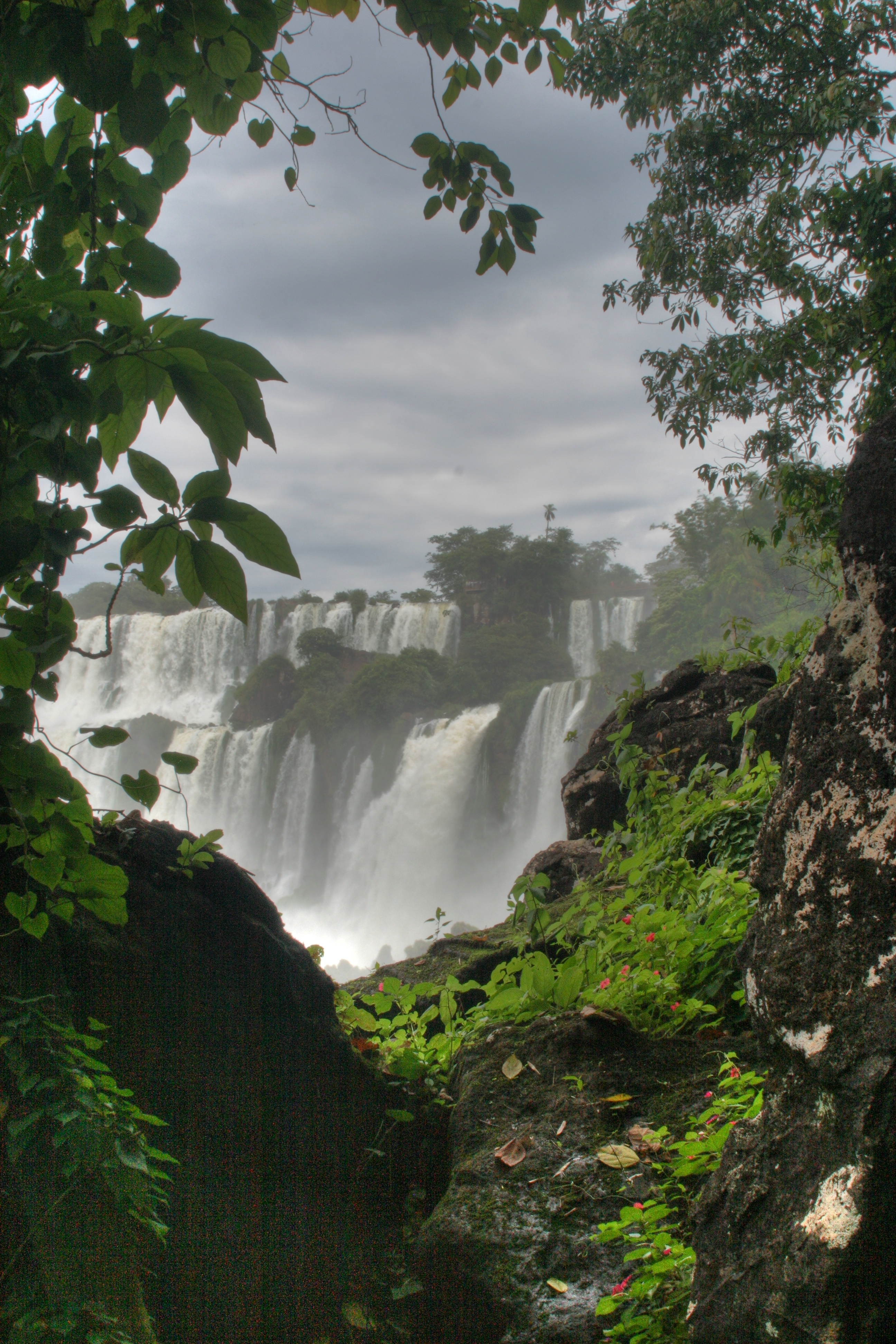 Iguazu Falls